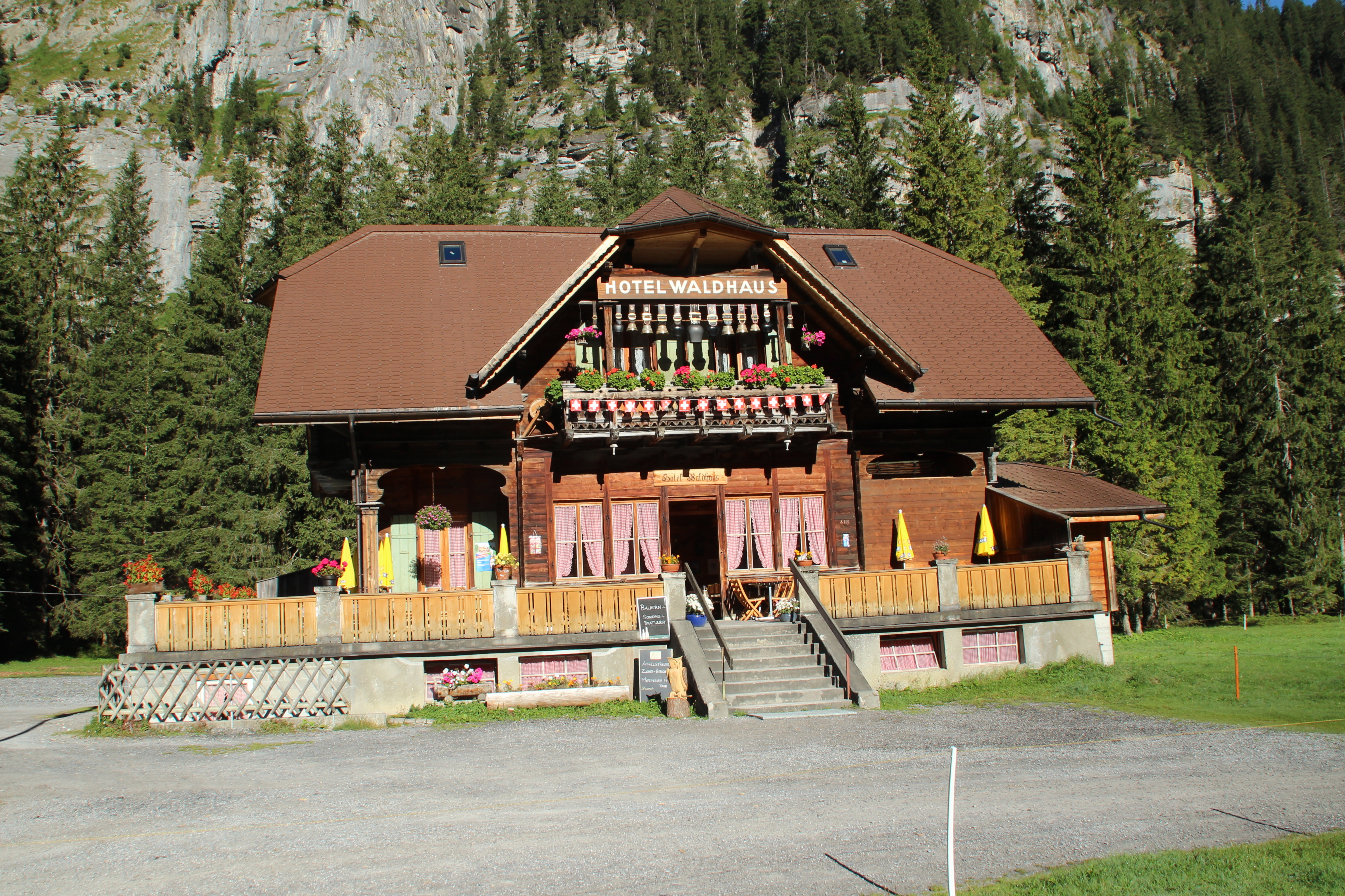 Das Waldhaus im